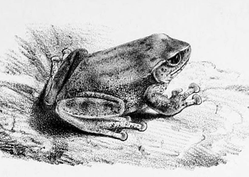 Pseudophilautus variabilis